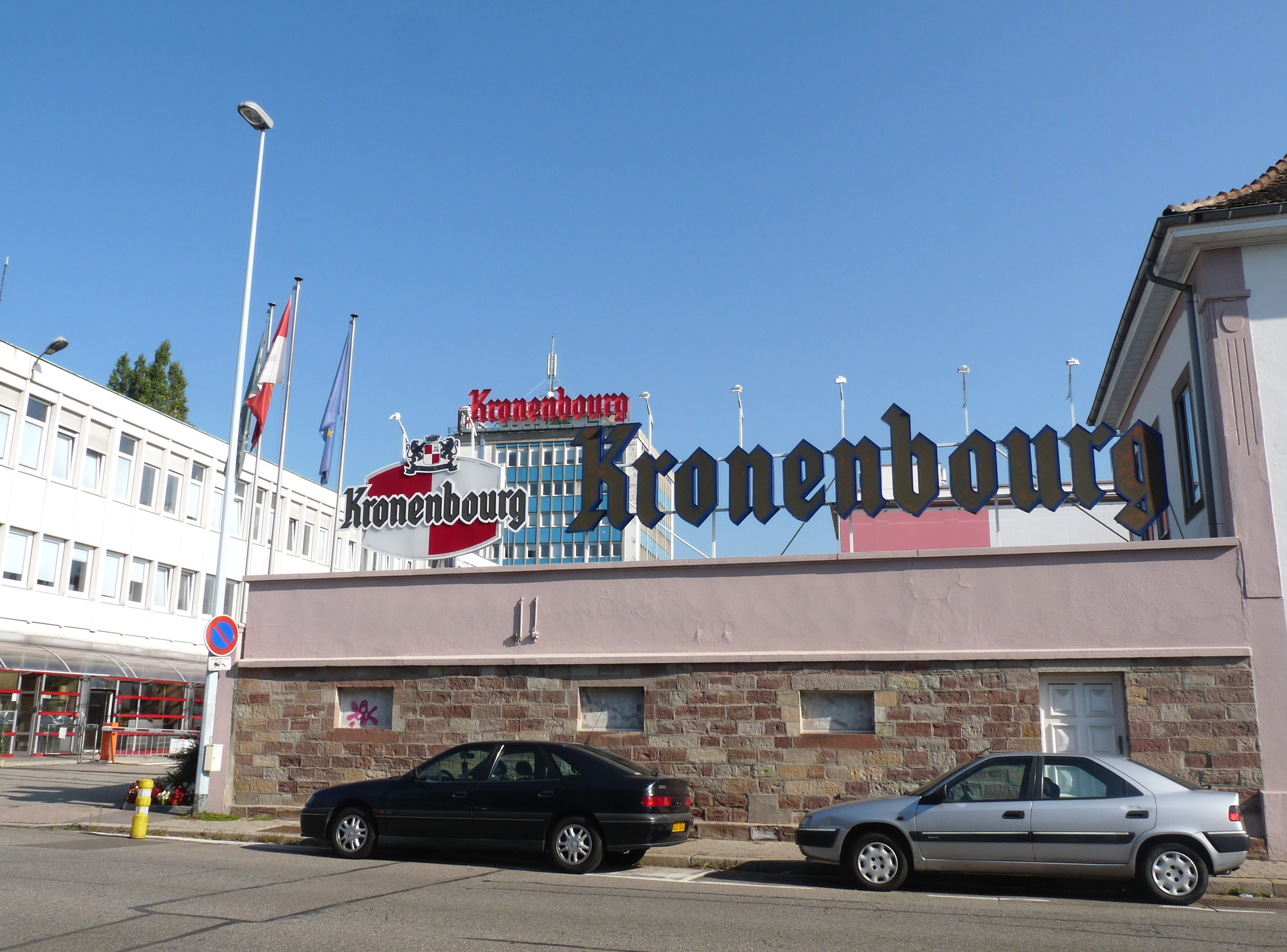 Siège social des brasseries Kronenbourg à Strasbourg-Cronenbourg, route d'Oberhausbergen.